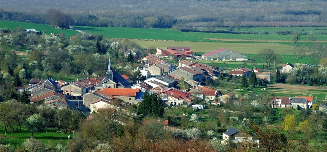 Vue générale de Brandeville (Meuse)